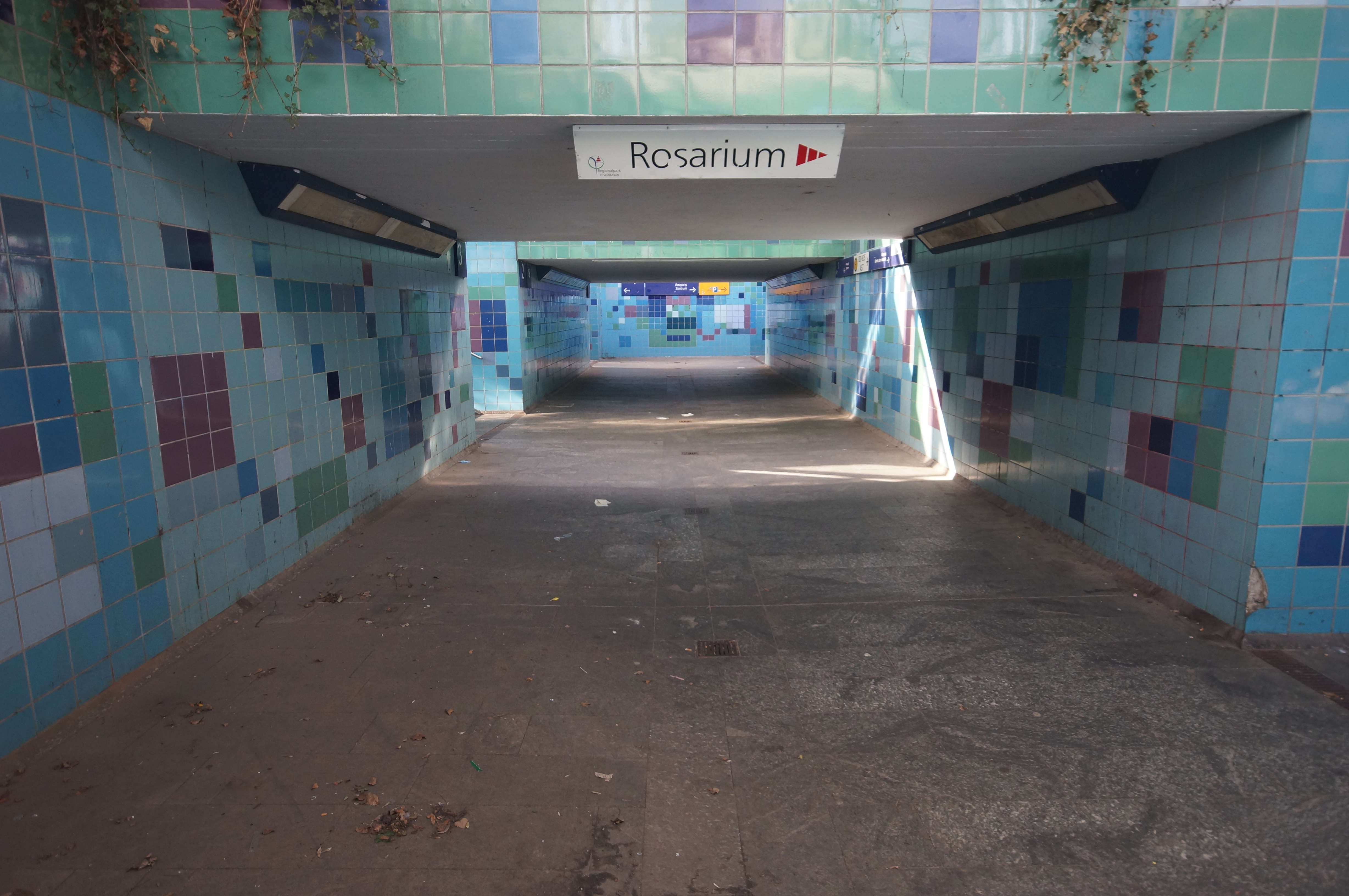 Die Unterführung des Bahnhofs Hattersheim (Main) der Stadt Hattersheim am Main